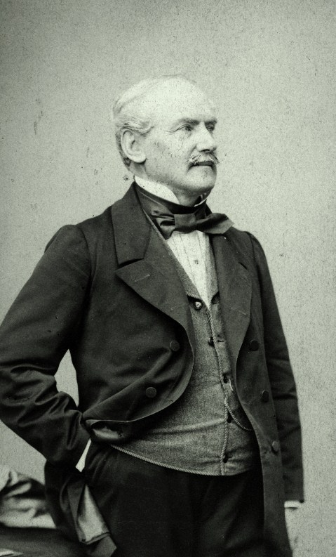 Valentin Ritter von Streffleur (1808–1870), Offizier, Publizist und Beamter